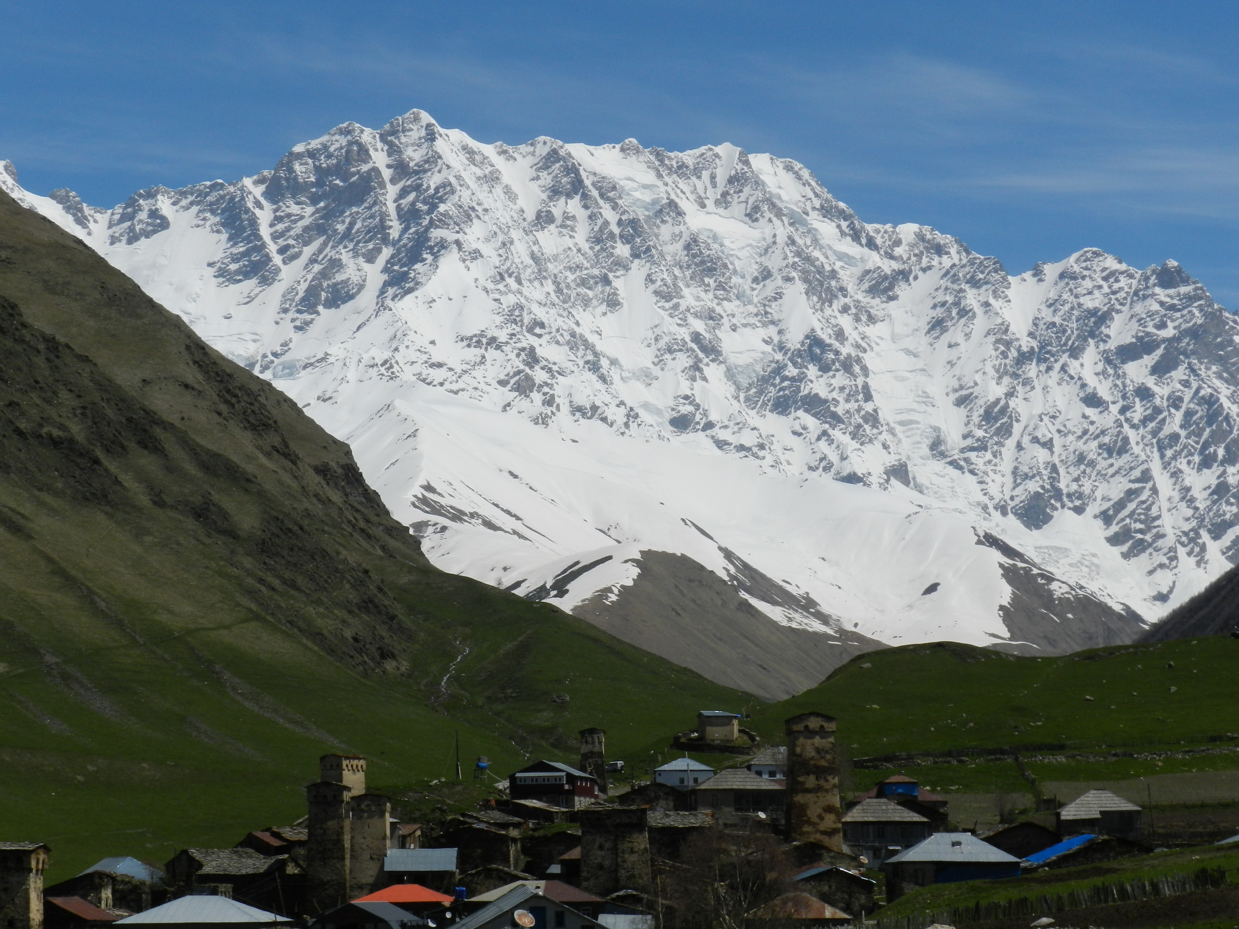 Der Schchara